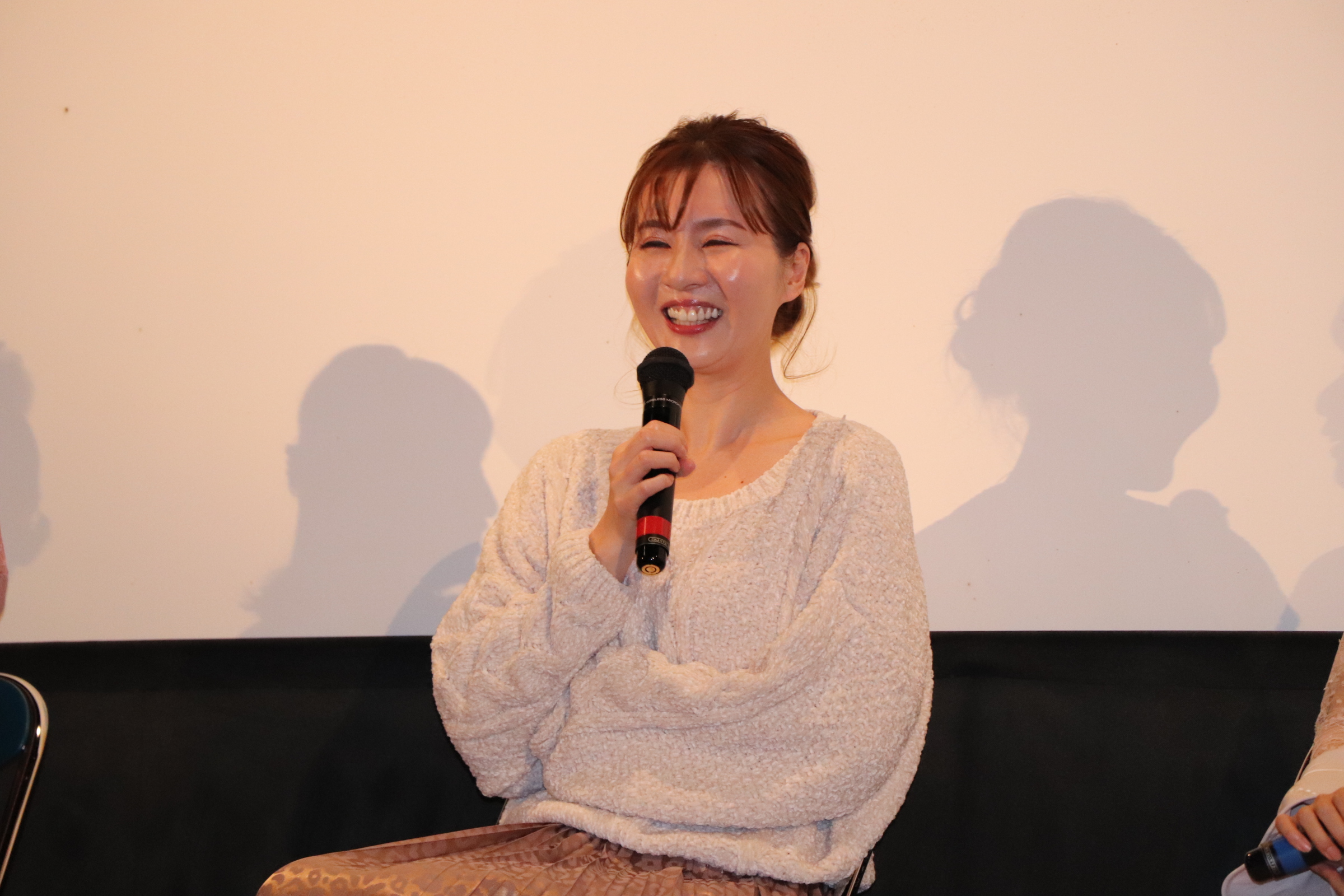 上野オークラ劇場 舞台挨拶・辰巳ゆい